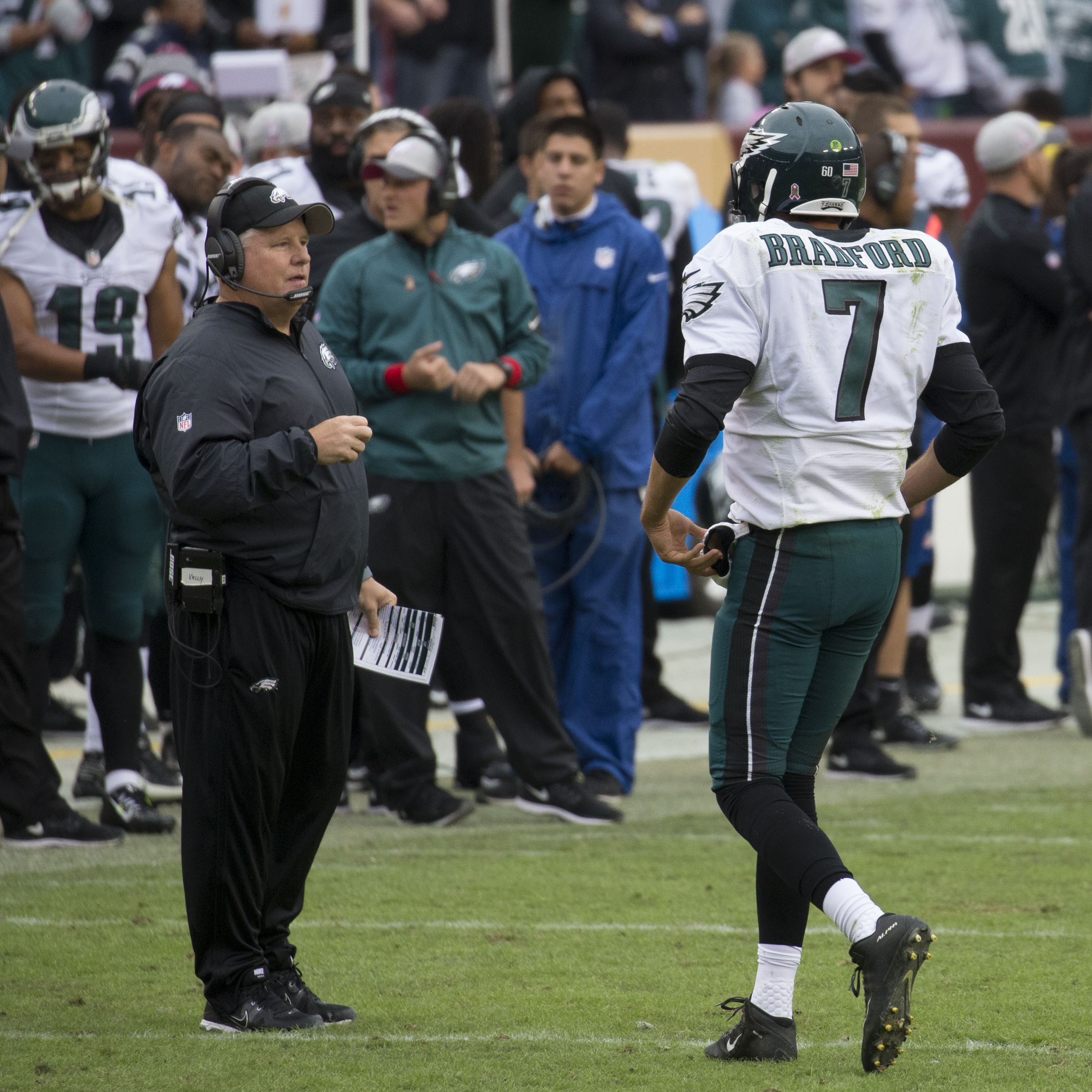 Eagles at Redskins 10/04/15